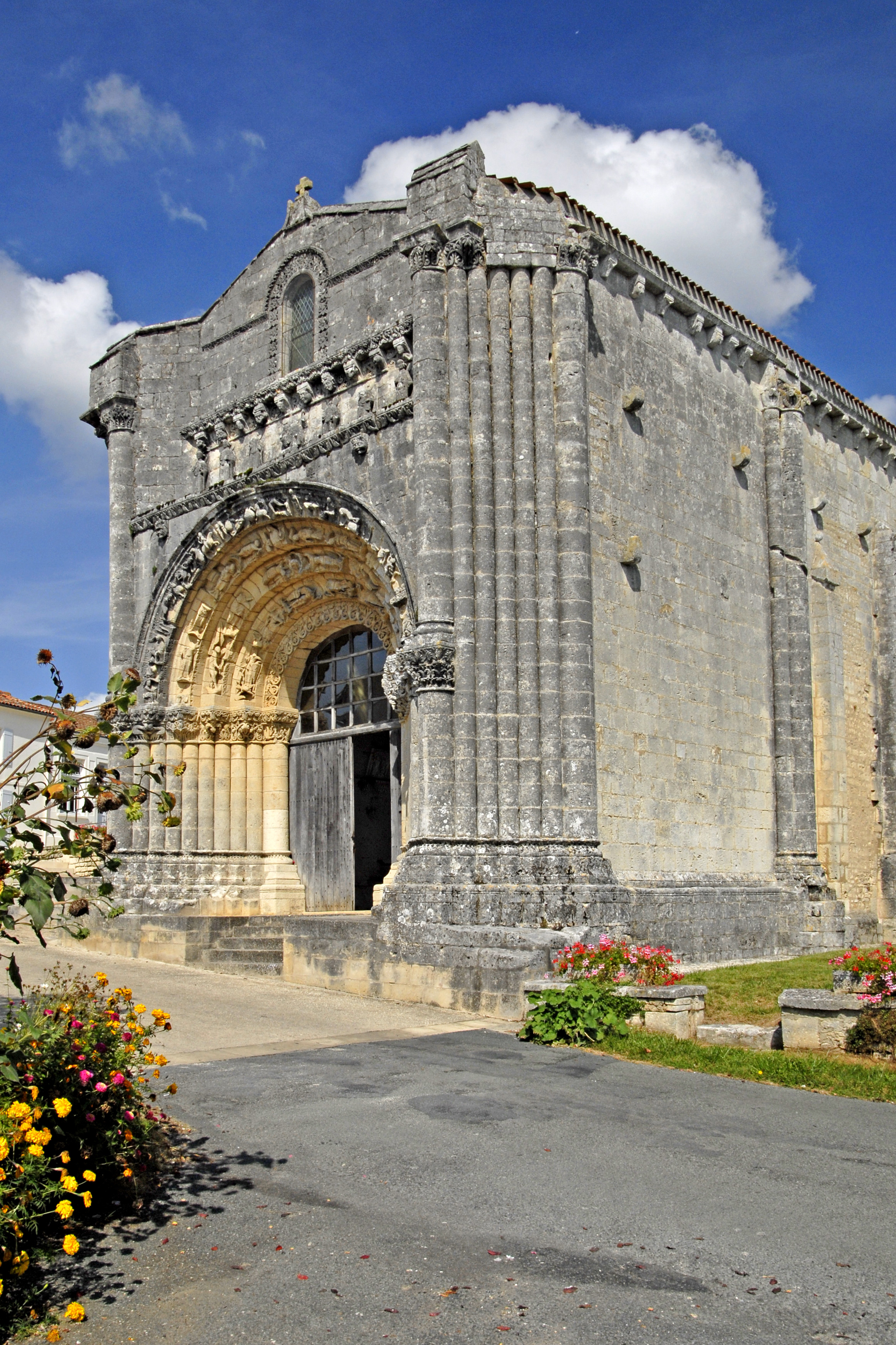 Fenioux, Fassade u. Anschluss Schiff von SW